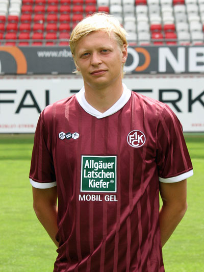 Manuel Hornig, Fußballspieler